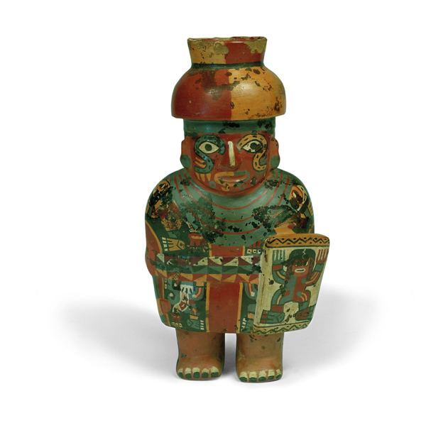 Vaso antropomorfo. Il vaso raffigura un guerriero con pitture facciali, un copricapo semisferico e una veste elaborata. Porta nella mano sinistra uno scudo decorato con una figura con le braccia alzate. L'oggetto possiede un gemello: spesso gli oggetti rituali nel mondo andino erano fabbricati in coppie.